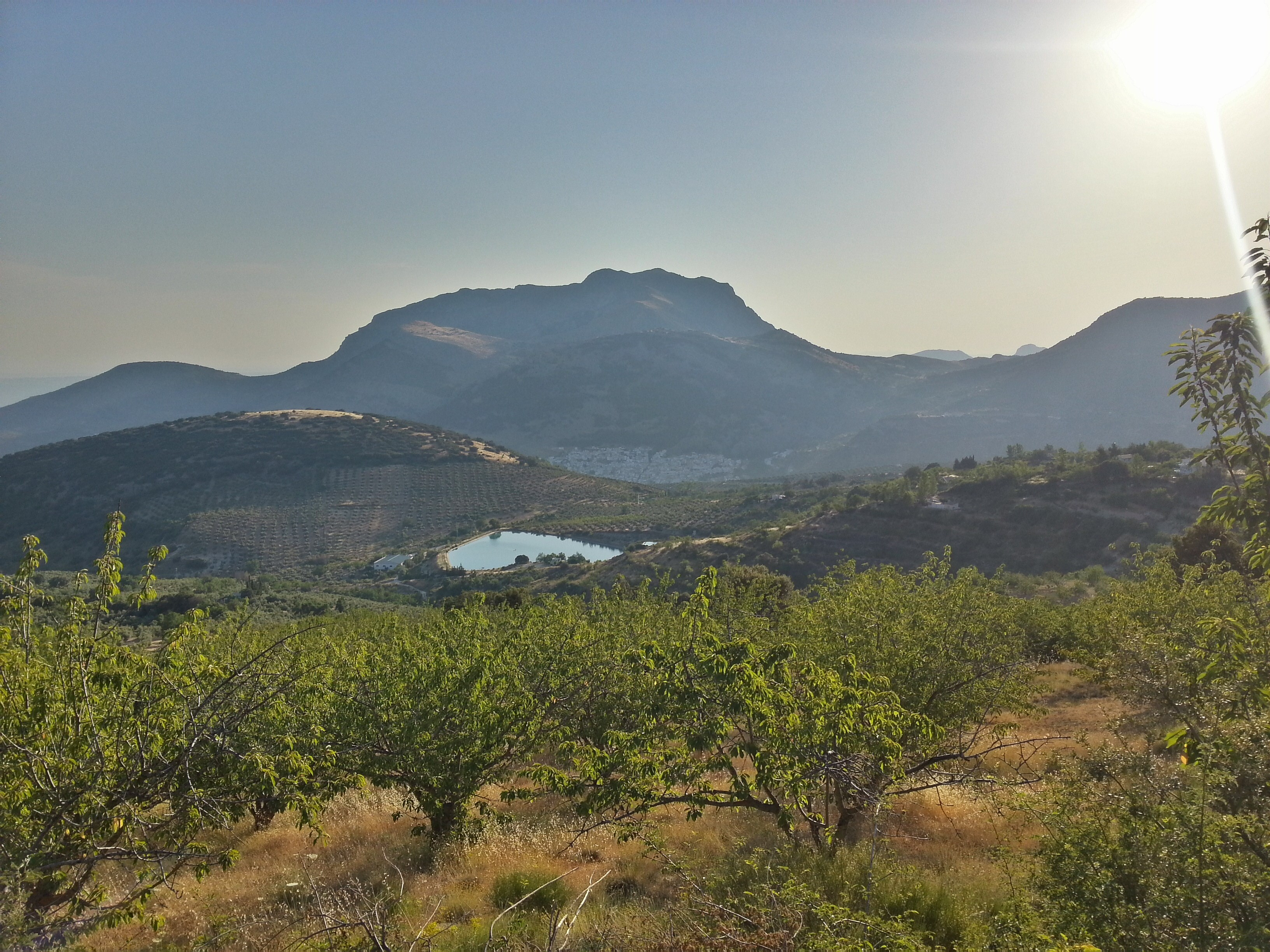 Campos de cerezos en el parque natural de Sierra Mágina. Torres al fondo.